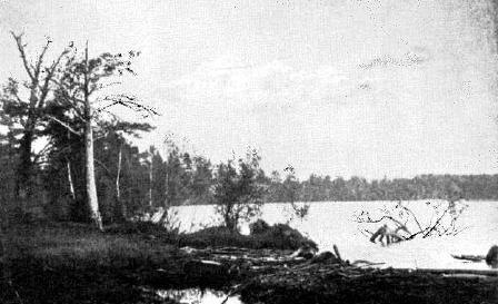 Беларуская (тарашкевіца): Возера Сьвіцязь, здымак канца XIX стагодзьдзя